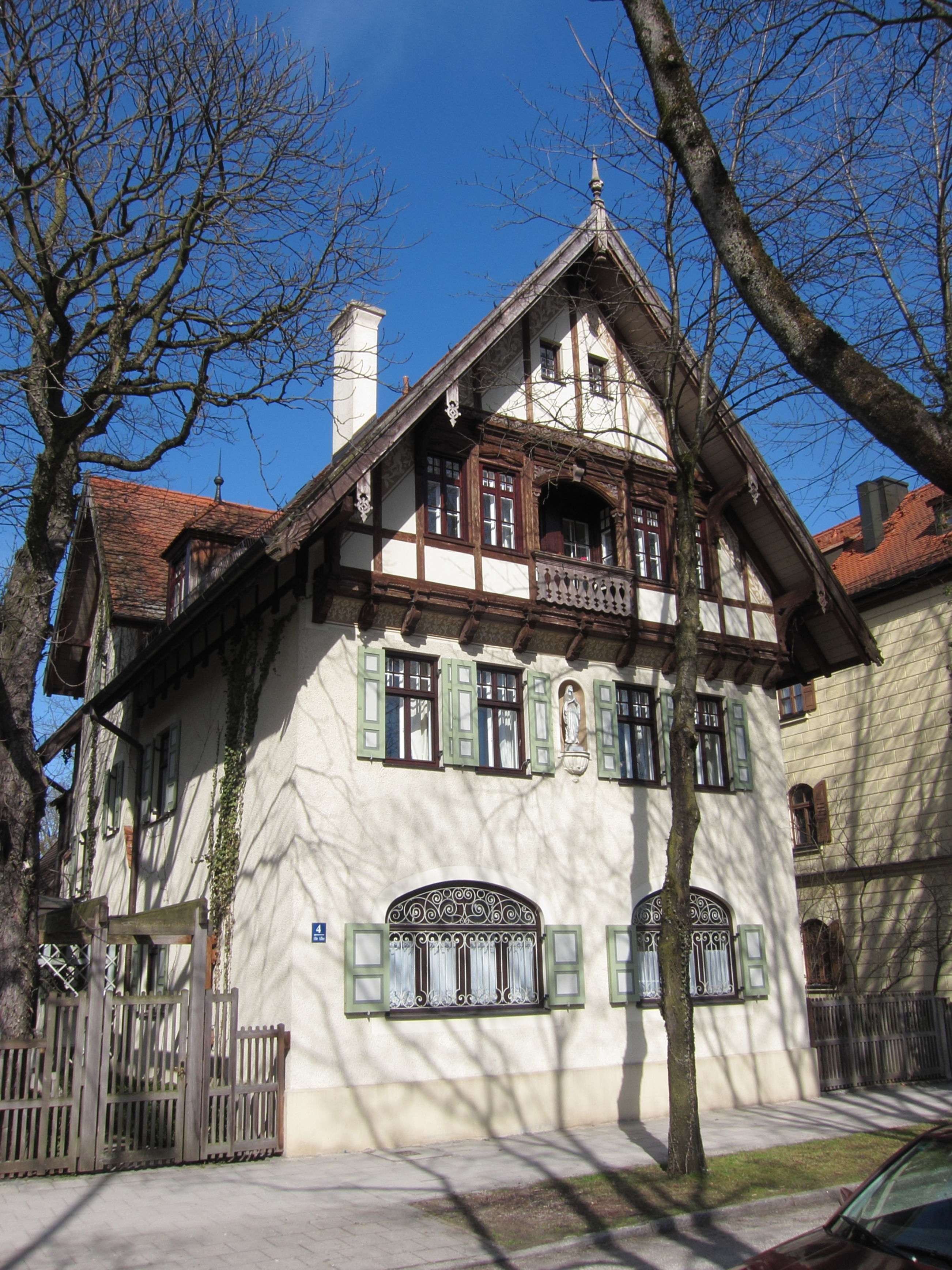 Alte Allee 4; Vorstadthaus, Fachwerkgiebel, Bemalung, 1898 von Gustav Rühl.